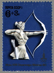 USSR semi-postal stamp, 1980 Olympic Games, 1977, 6 + 3 k.